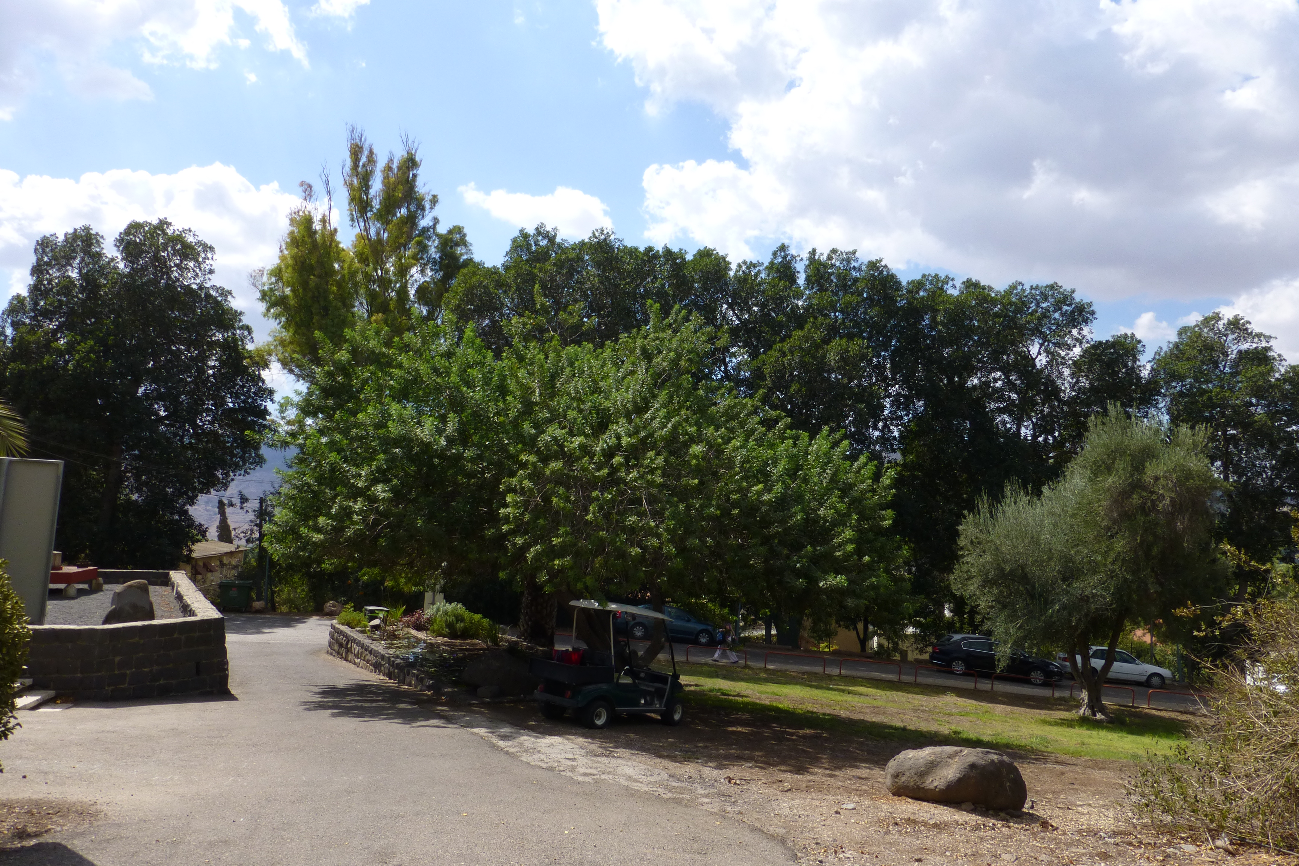 "המשכן לאמנות על שם חיים אתר" או "המשכן לאמנות, עין חרוד" הנו מוזיאון לאמנות ישראלית שהוקם בשנת 1937 בקיבוץ עין חרוד.